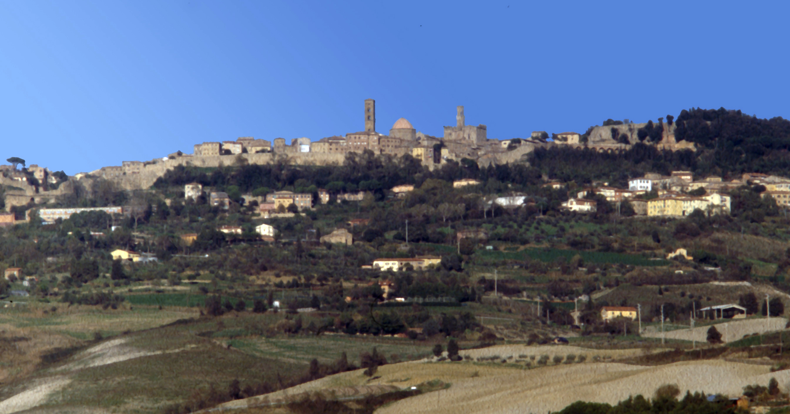 Volterra 1999